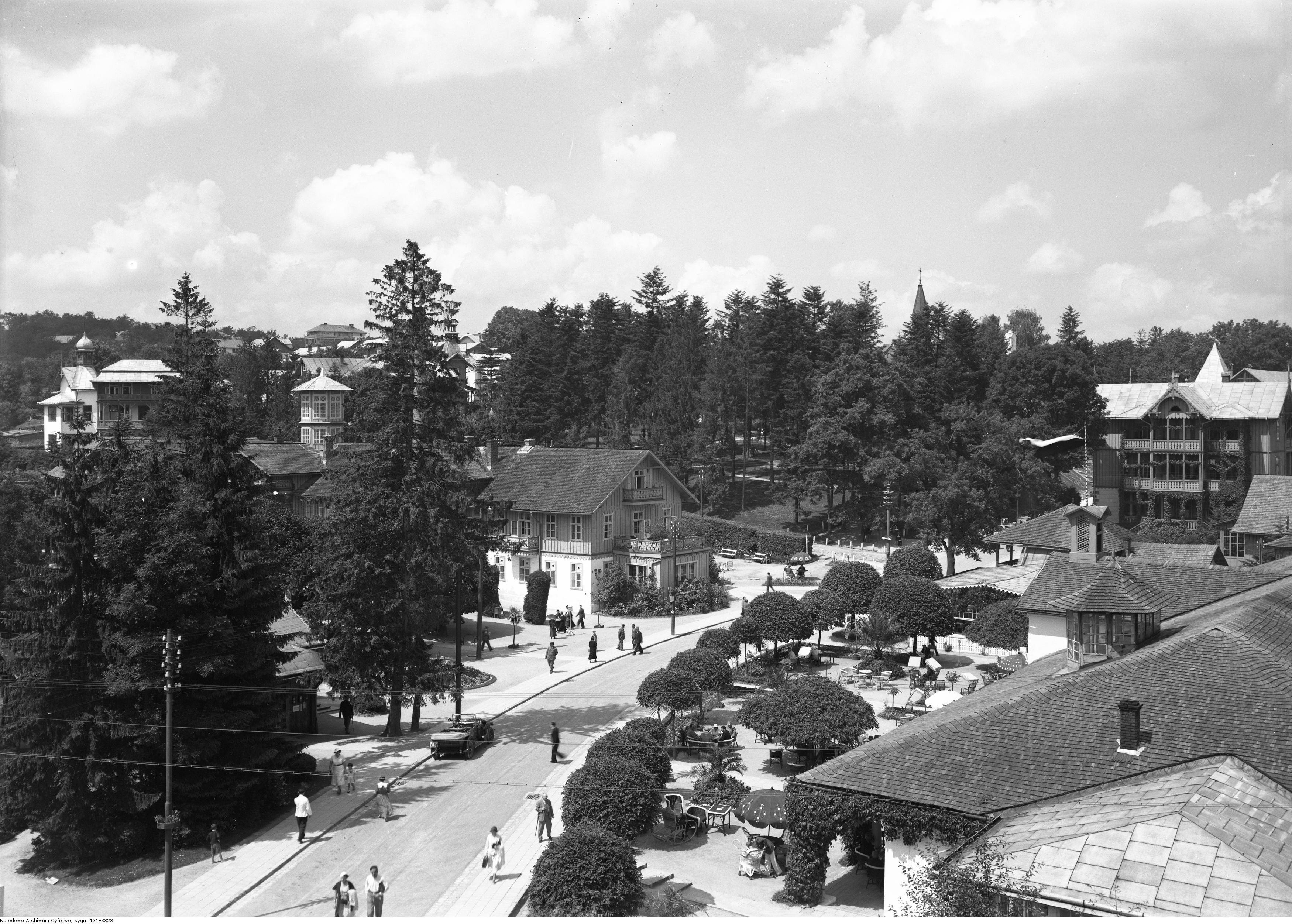 Deptak [- widok z lotu ptaka.]